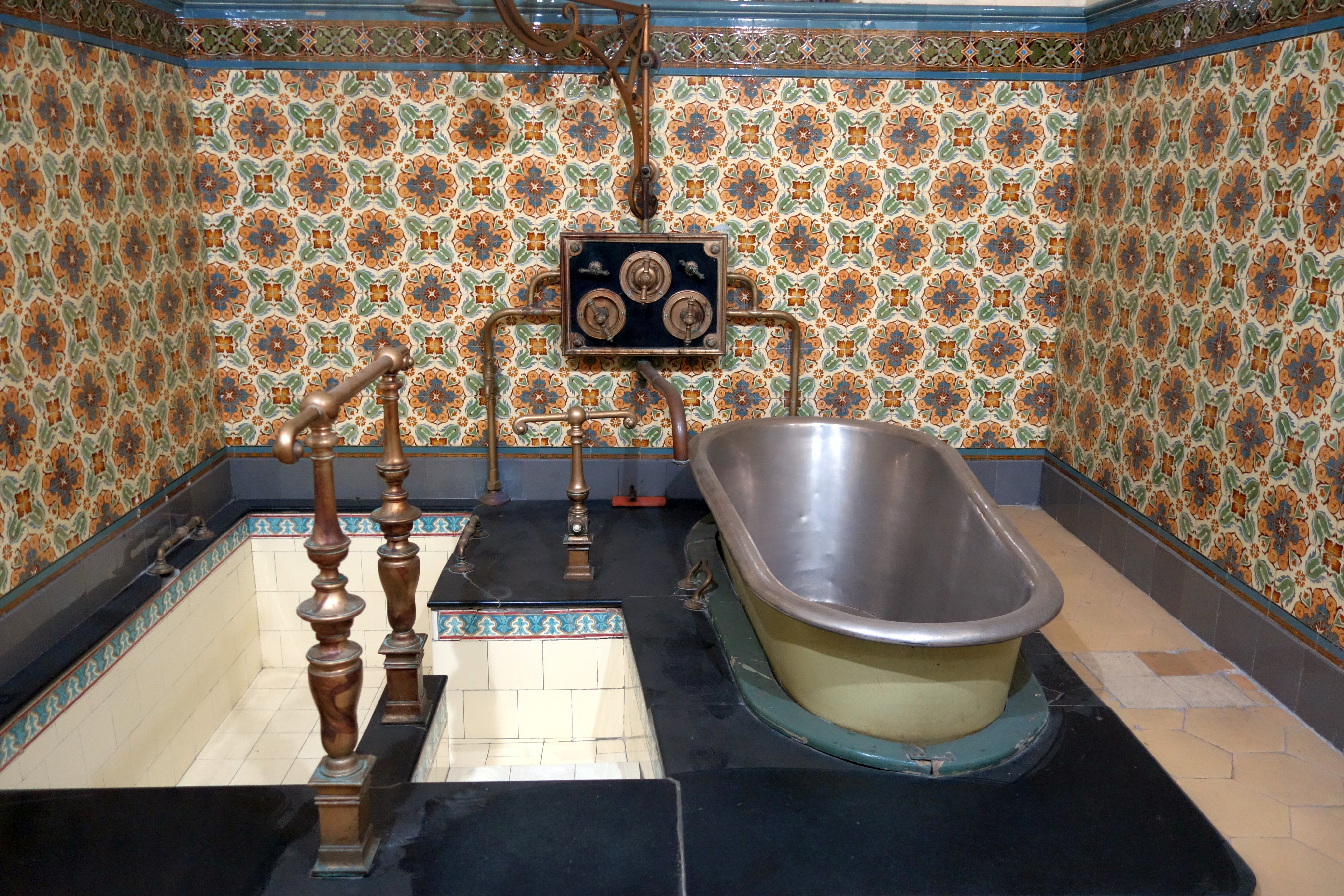 Kaiserbad (Lázně I), Karlsbad (Karlovy Vary), Tschechien, 2016.